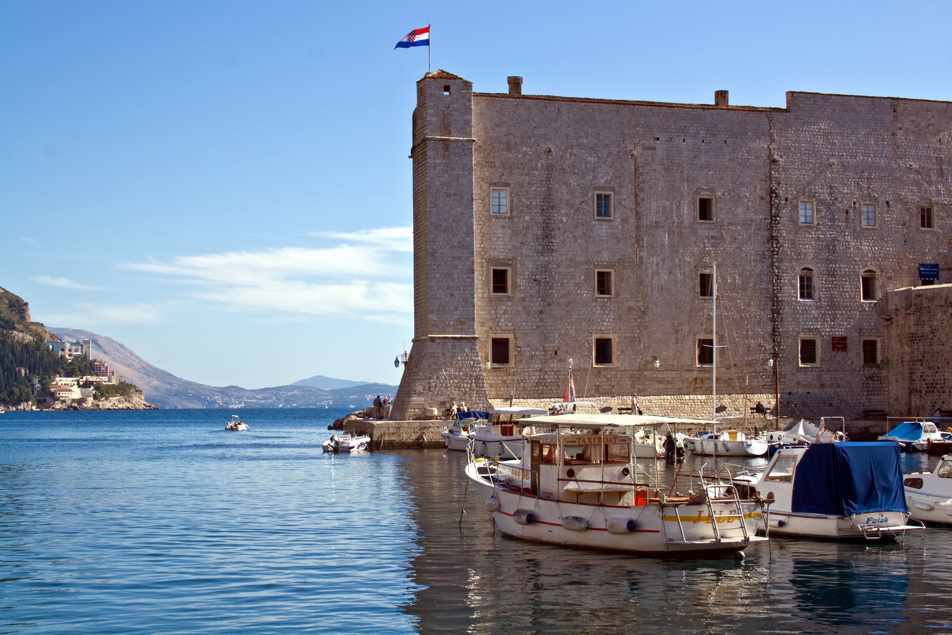 Dubrovnik,_am_alten_Stadthafen